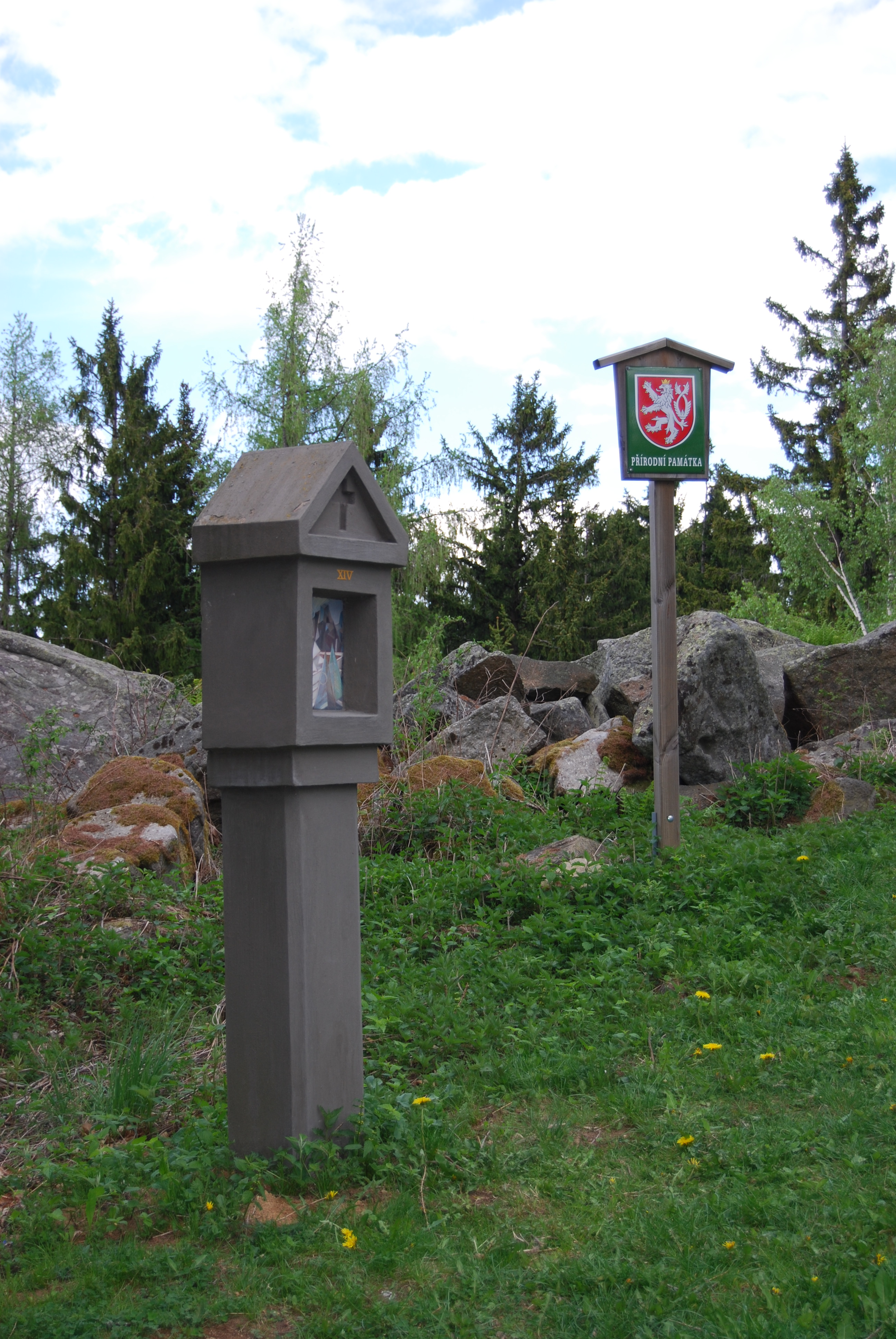 Jednotlivá zastavení křížové cesty na přírodní památce Mařský vrch. Obec Svatá Maří se nachází v okrese Prachatice, kraj Jihočeský, Česká republika.